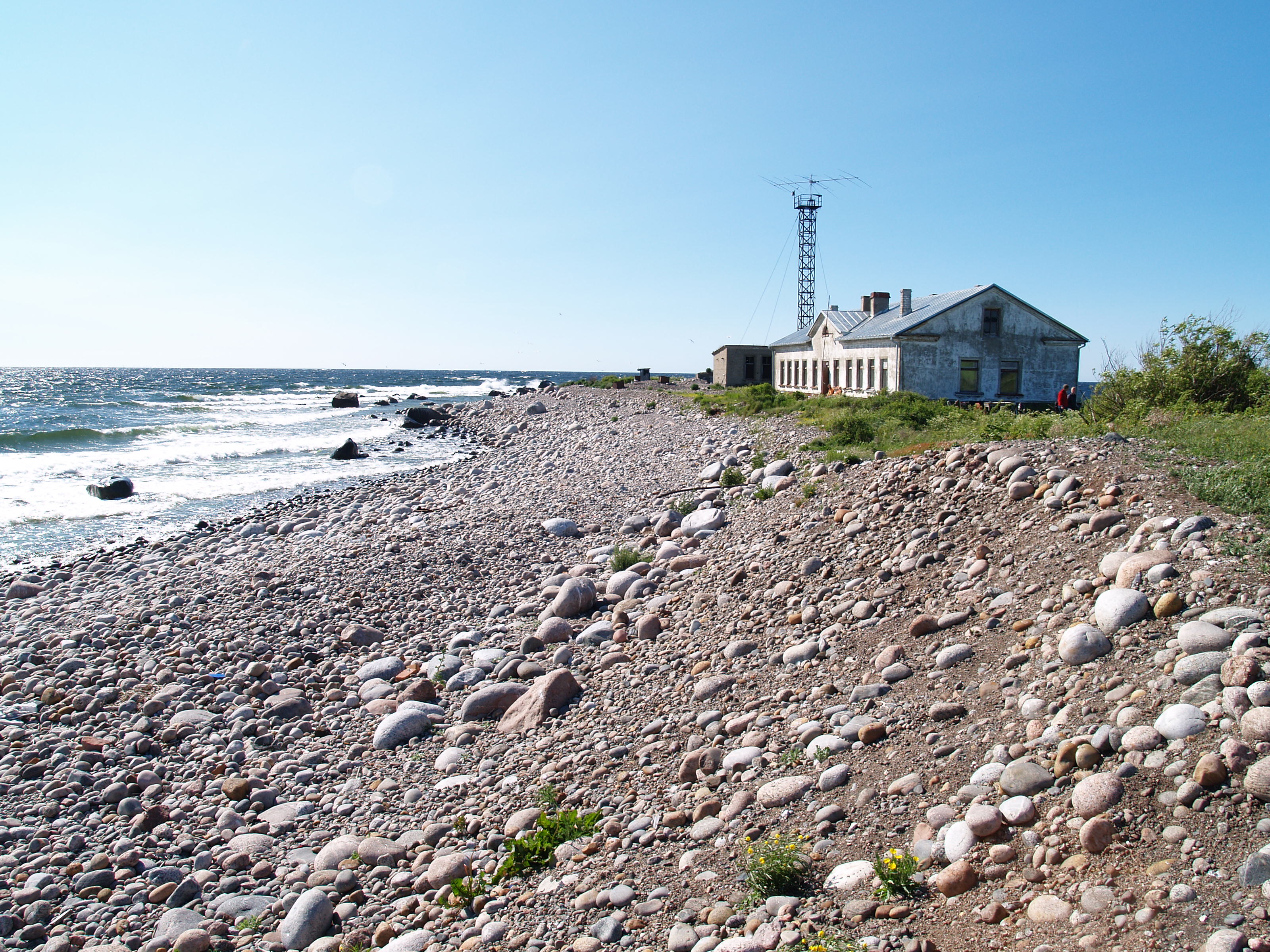 Keri saar